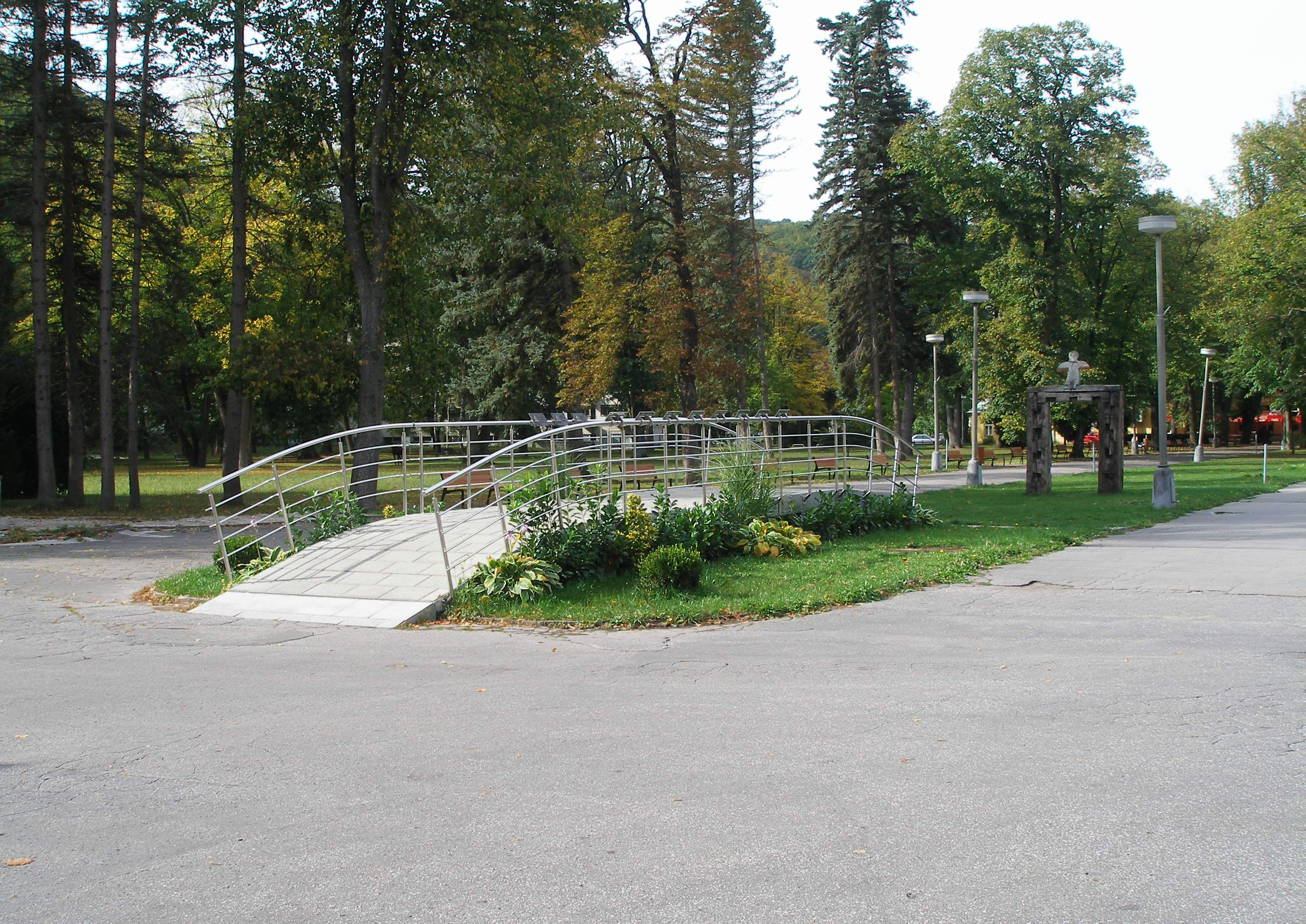 Most Slávy v Trenčianských Teplicích. Most vede "odnikud nikam".